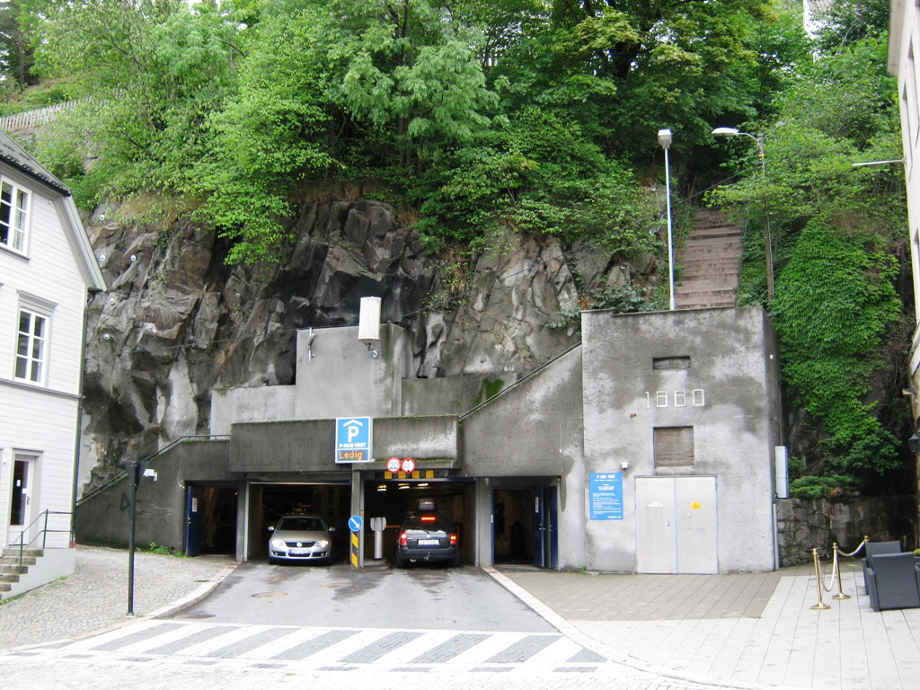 Trapper laget i 1880 fra Vesterveien til Høyveien i Arendal